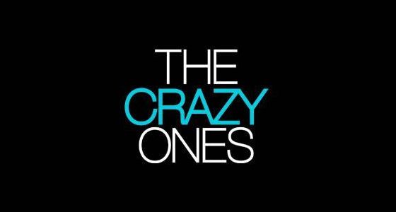 Diese Grafik zeigt das Logo der TV Serie The Crazy Ones